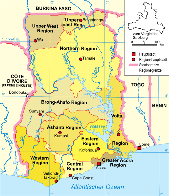 Politische Karte Ghanas